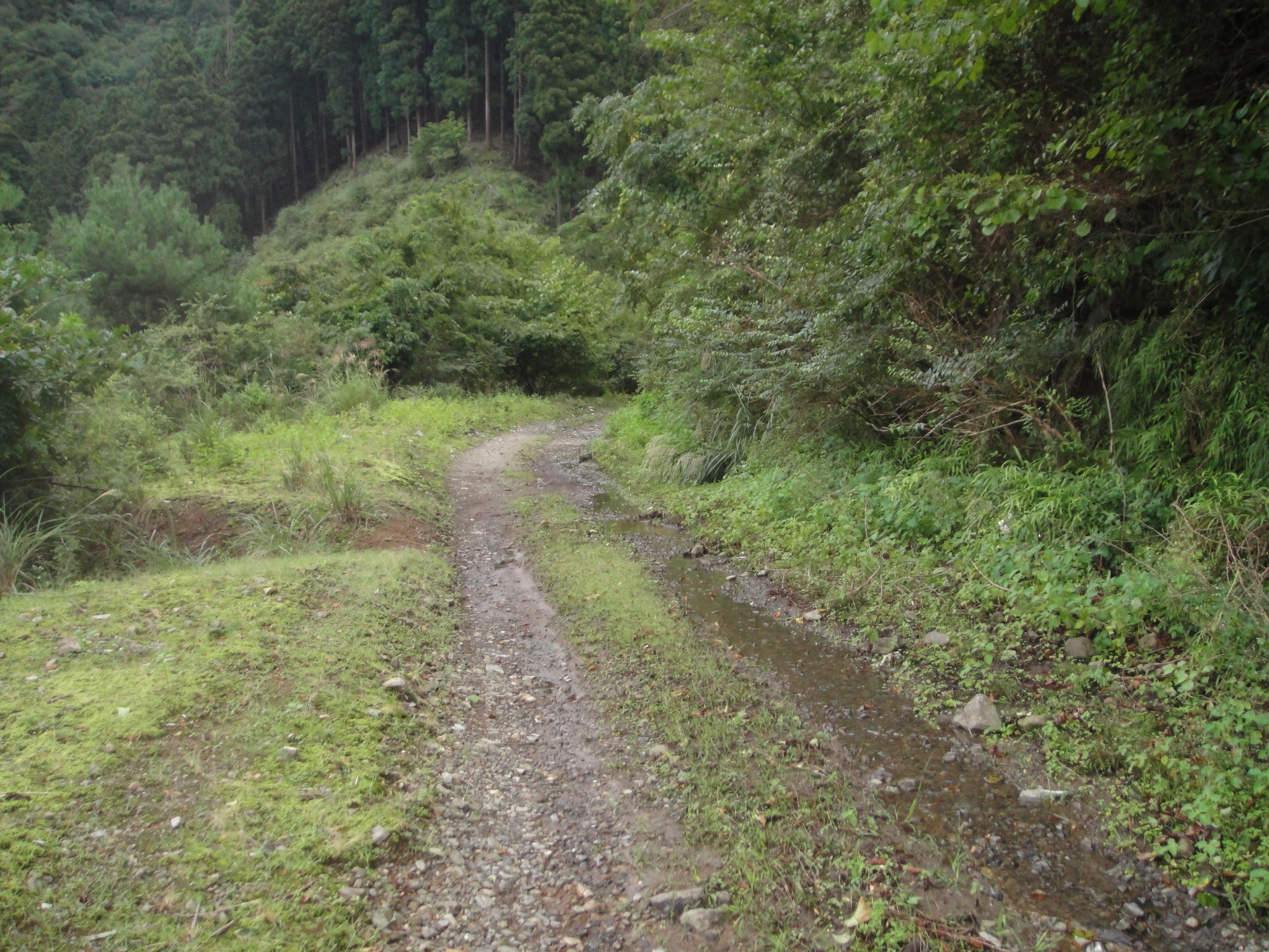 清川村道土山高畑線 未完成道路 神奈川県清川村